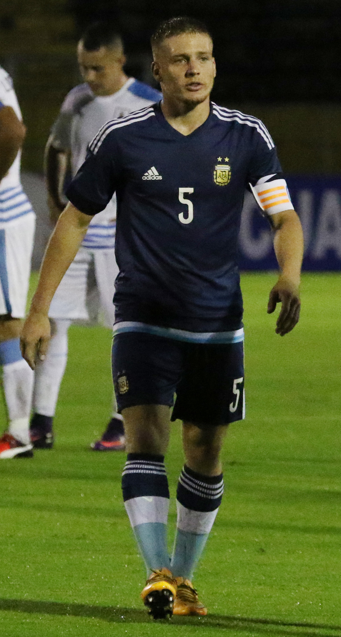 ARGENTINA URUGUAY 2 MAV